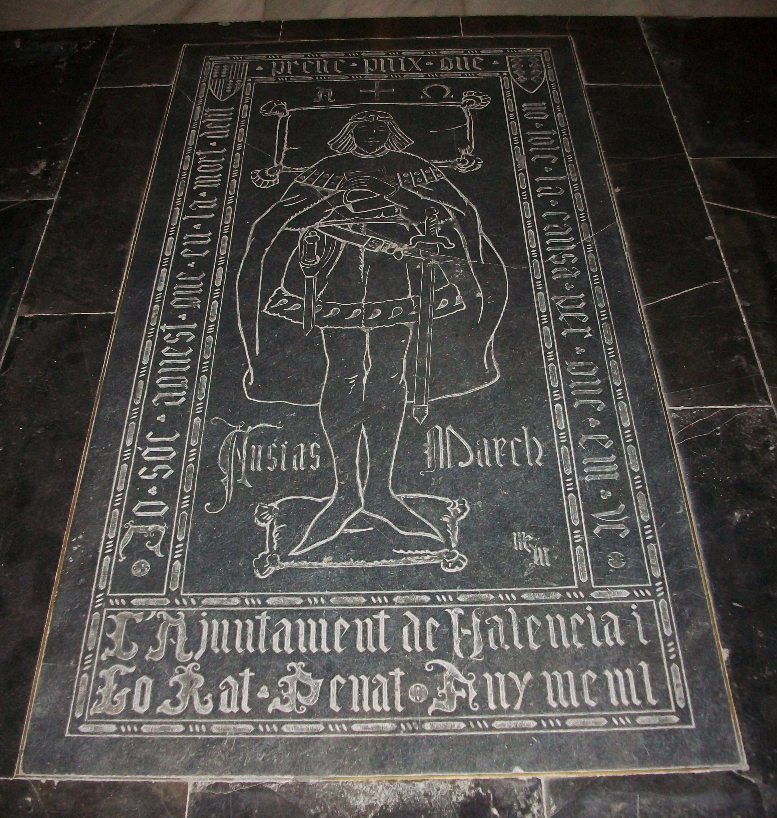 Suposada tomba d'Ausiàs March a la catedral de València.